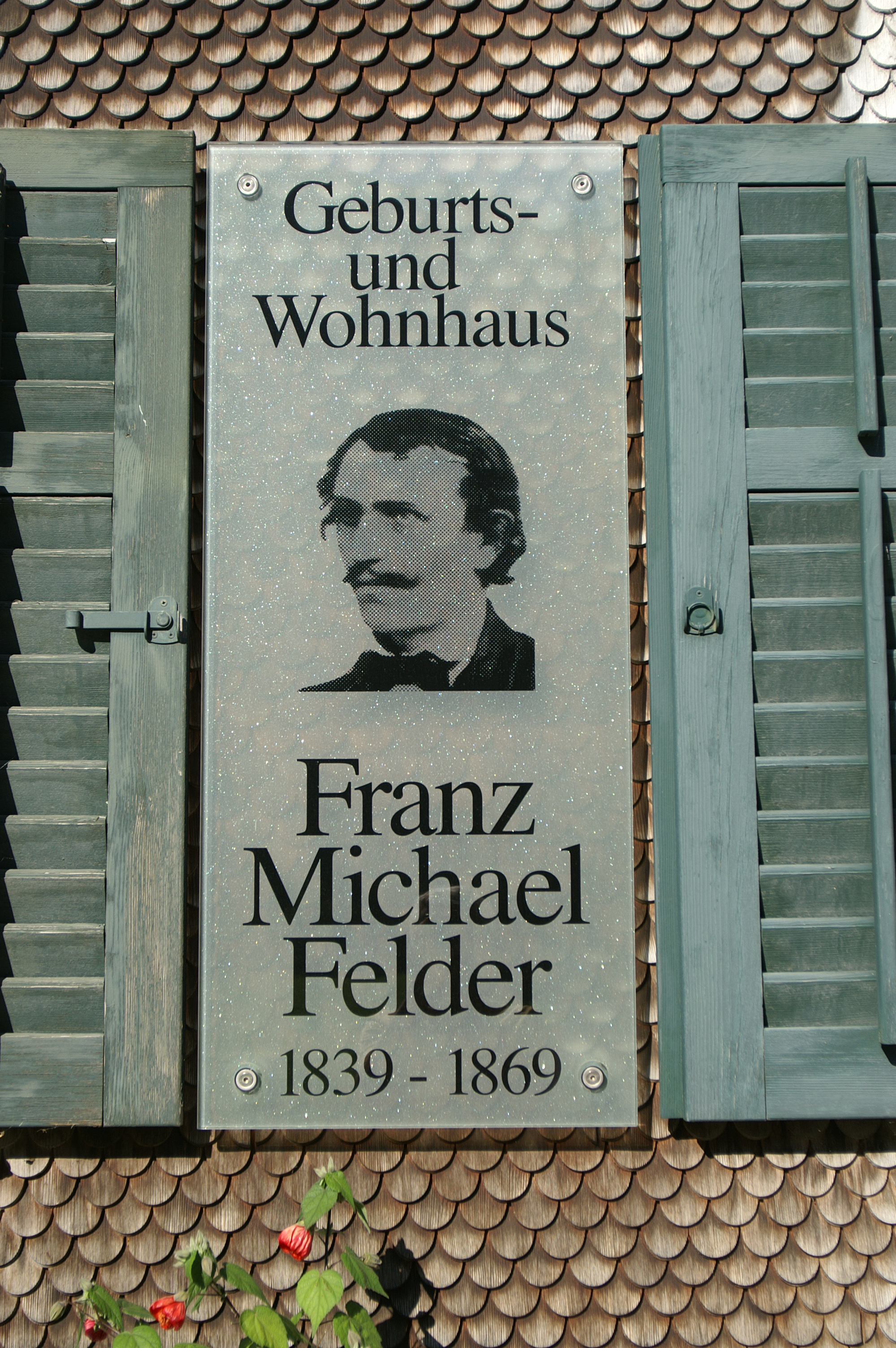 Gedenktafel an Franz Michael Felder an seinem Geburtshaus in Schoppernau , Vorarlberg